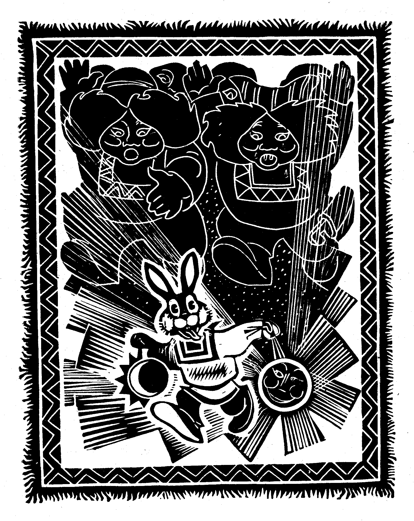 Иллюстрация к книге "Эскимосские сказки и легенды". Художник Д. А. Брюханов